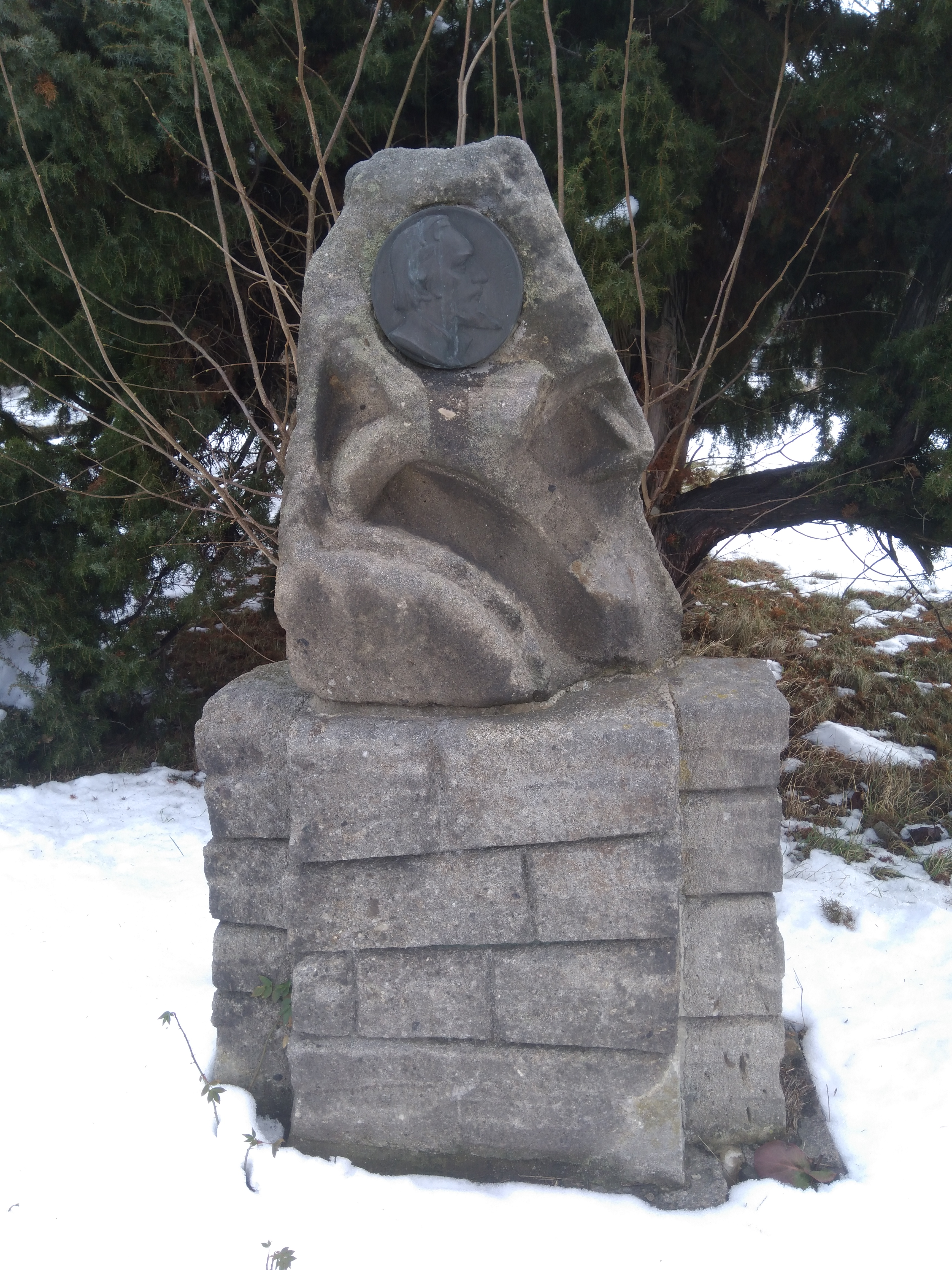 Pomník Jana Husa před Českobratrským kostelem v Žatecké ulici v Kralovicích.